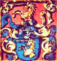 Wappen der Lürzer (Lirzer, Lürzer) bzw. Stammwappen der Lürzer von Zechenthal